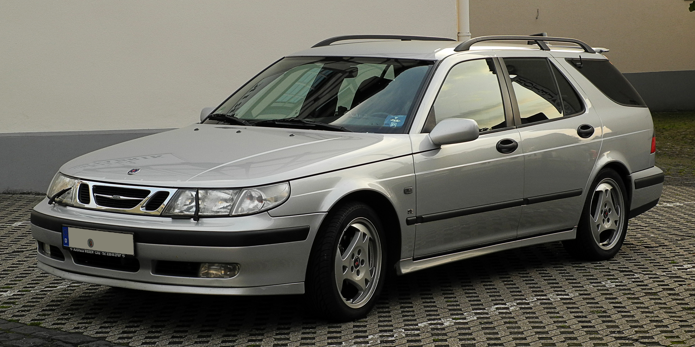 Saab 9-5 Sport-Kombi 2.3 Turbo SE (I)